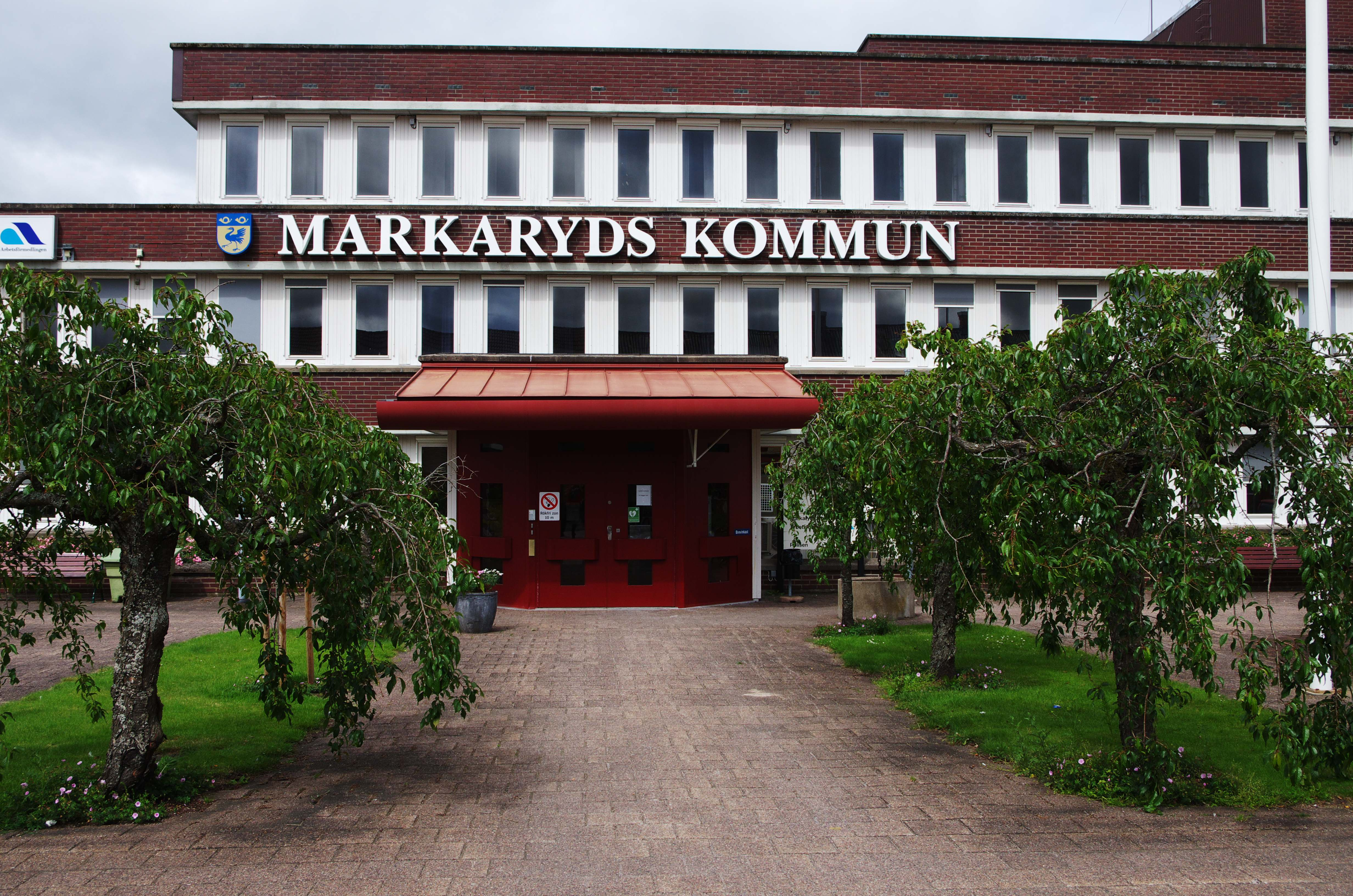 Kommunhuset i Markaryd.